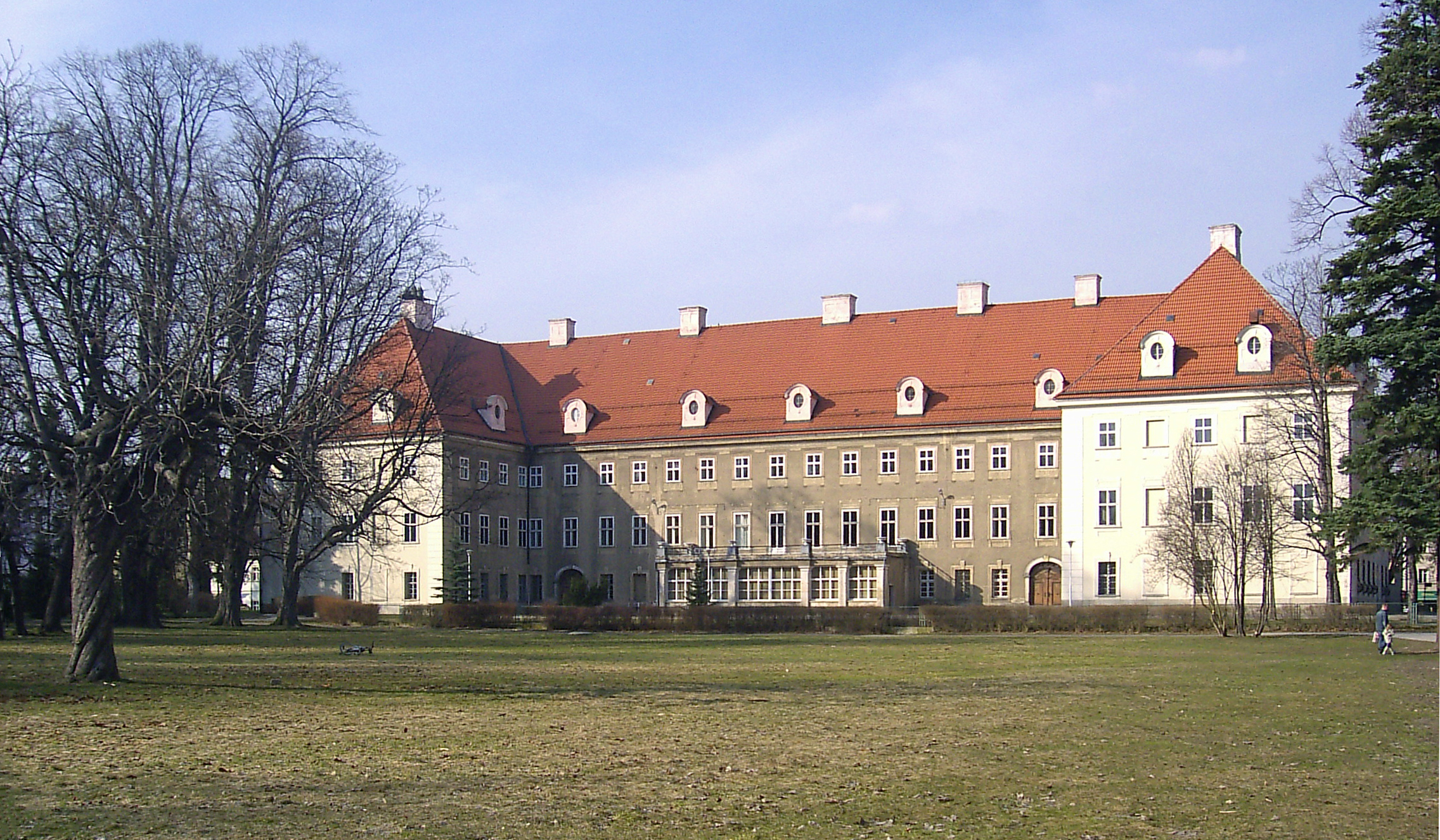 Pałac Schaffgotschów, ob. filia Politechniki Wrocławskiej w Cieplicach - elewacja od strony Parku Zdrojowego